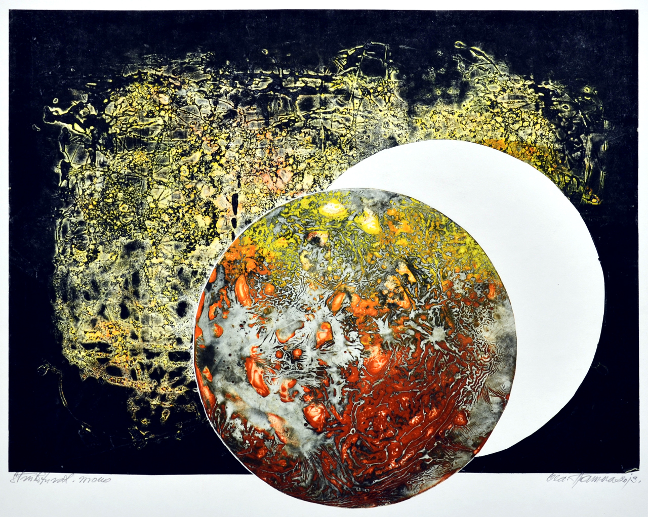 Oldřich Hamera, Planeta, strukturální monotyp, 33x44,5 cm, 2013